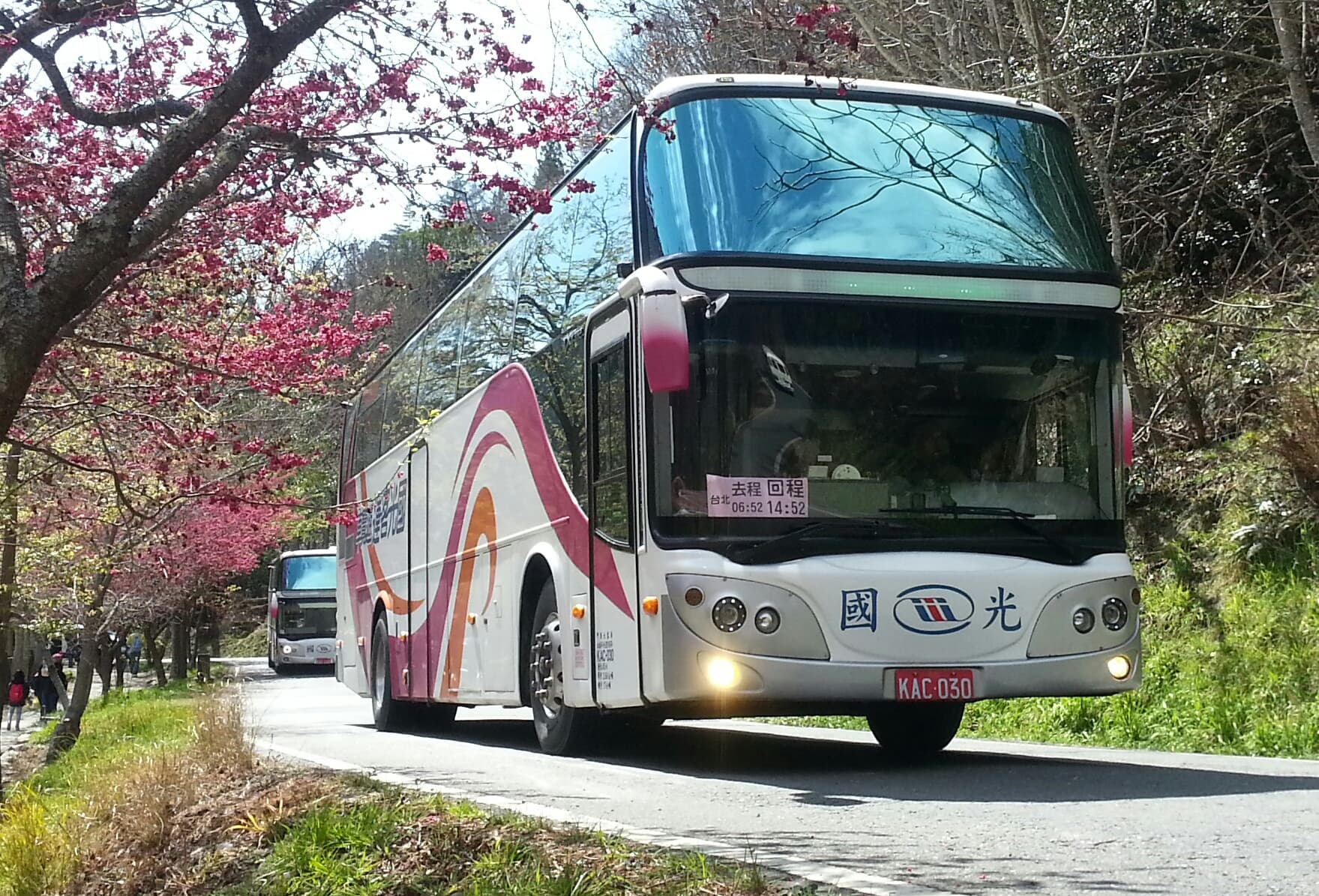 中文（台灣）: 國光客運2016年大宇TX4312遊覽車KAC-030。